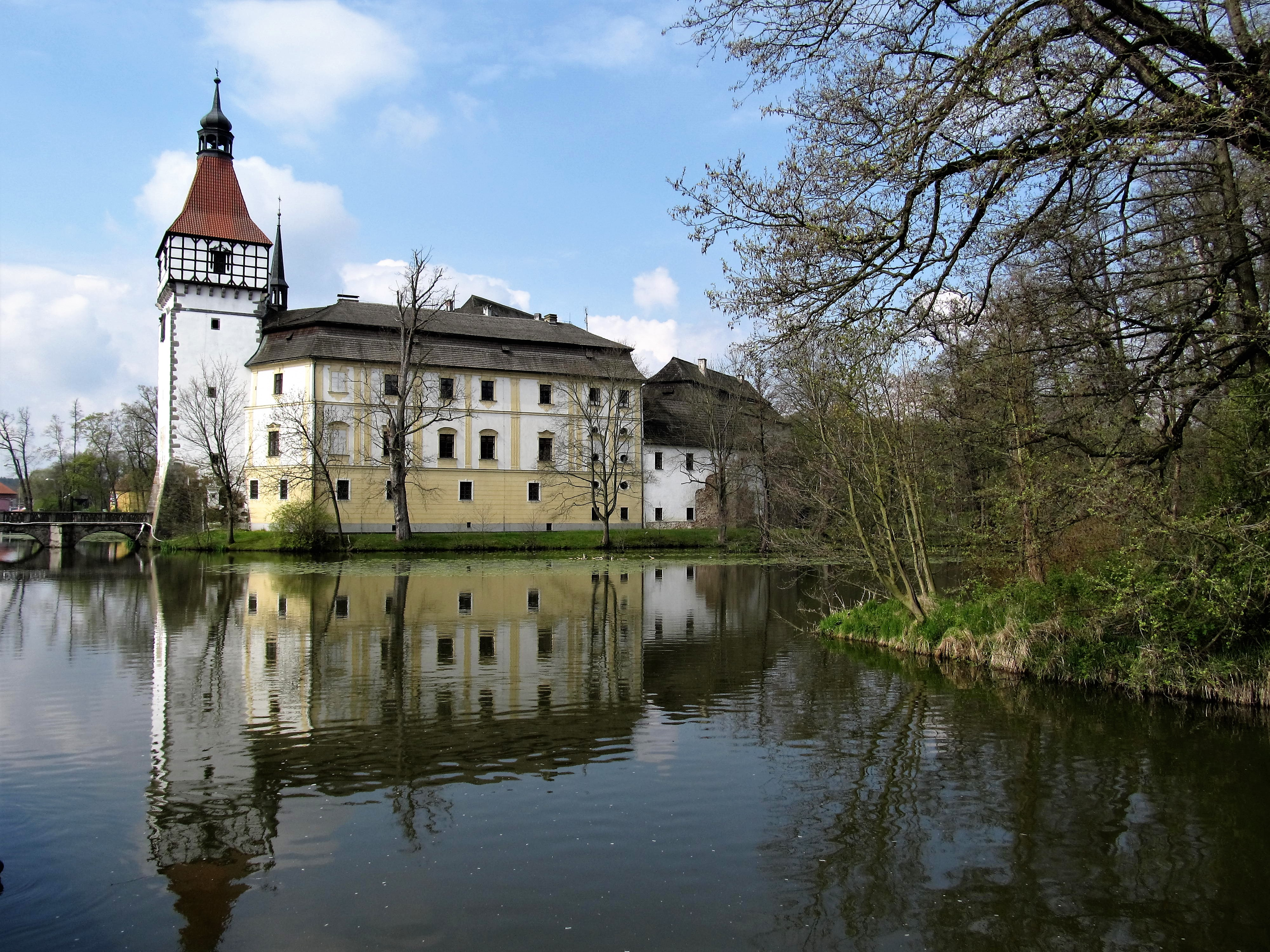 Pohled na zámek z města